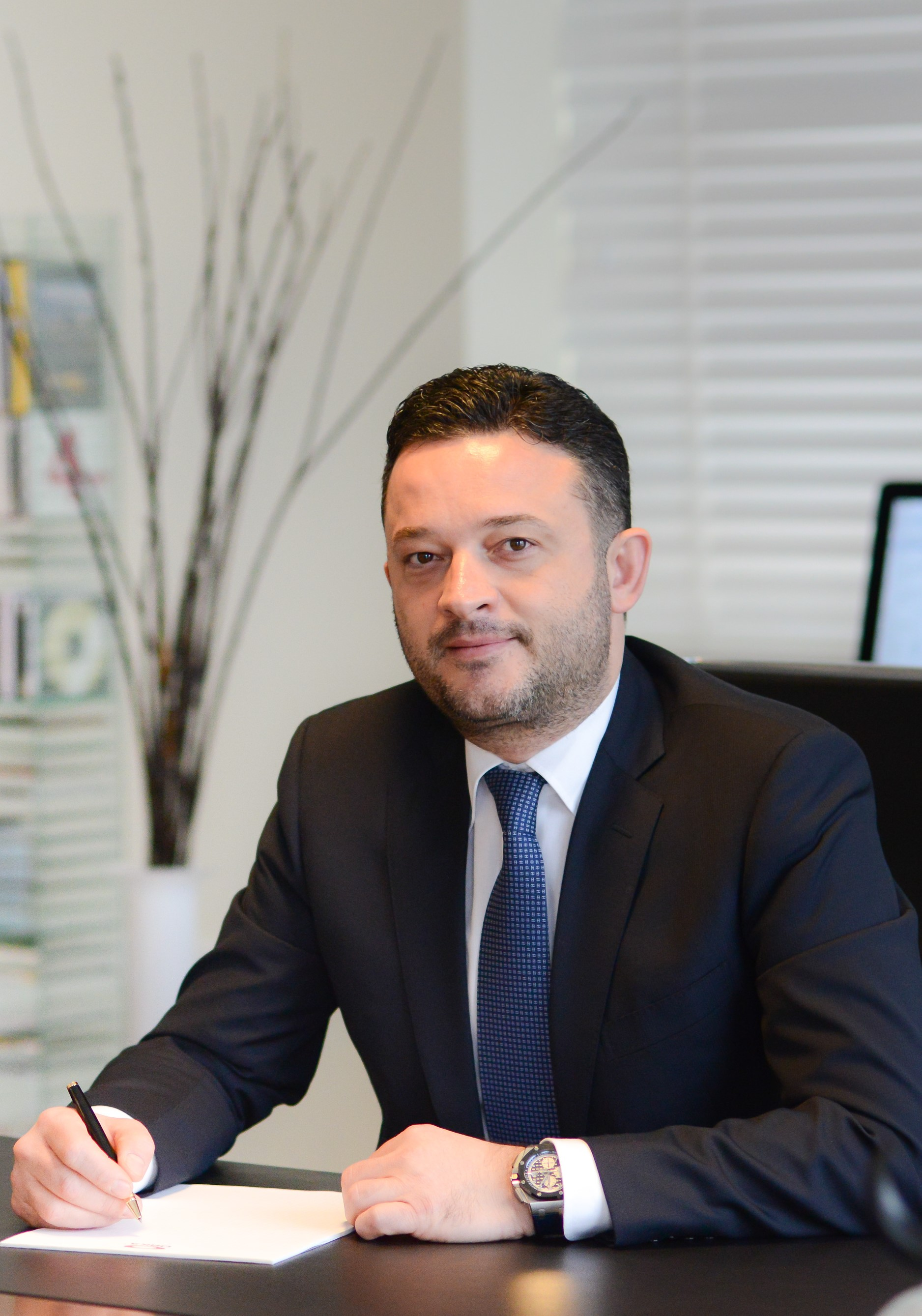 Јордан Камчев